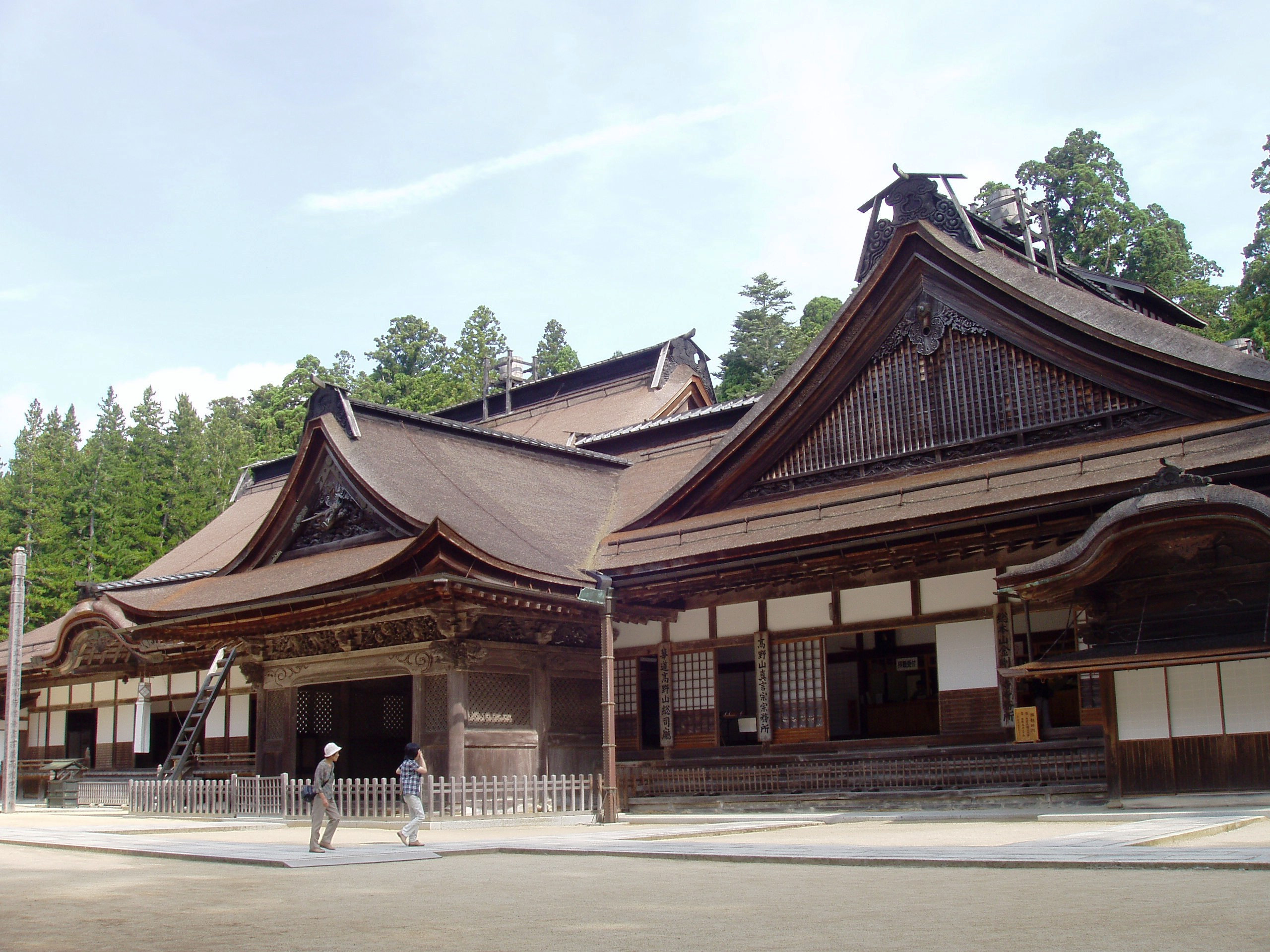 Kongobuji Temple, Koyasan, Wakayama prefecture, Japan.